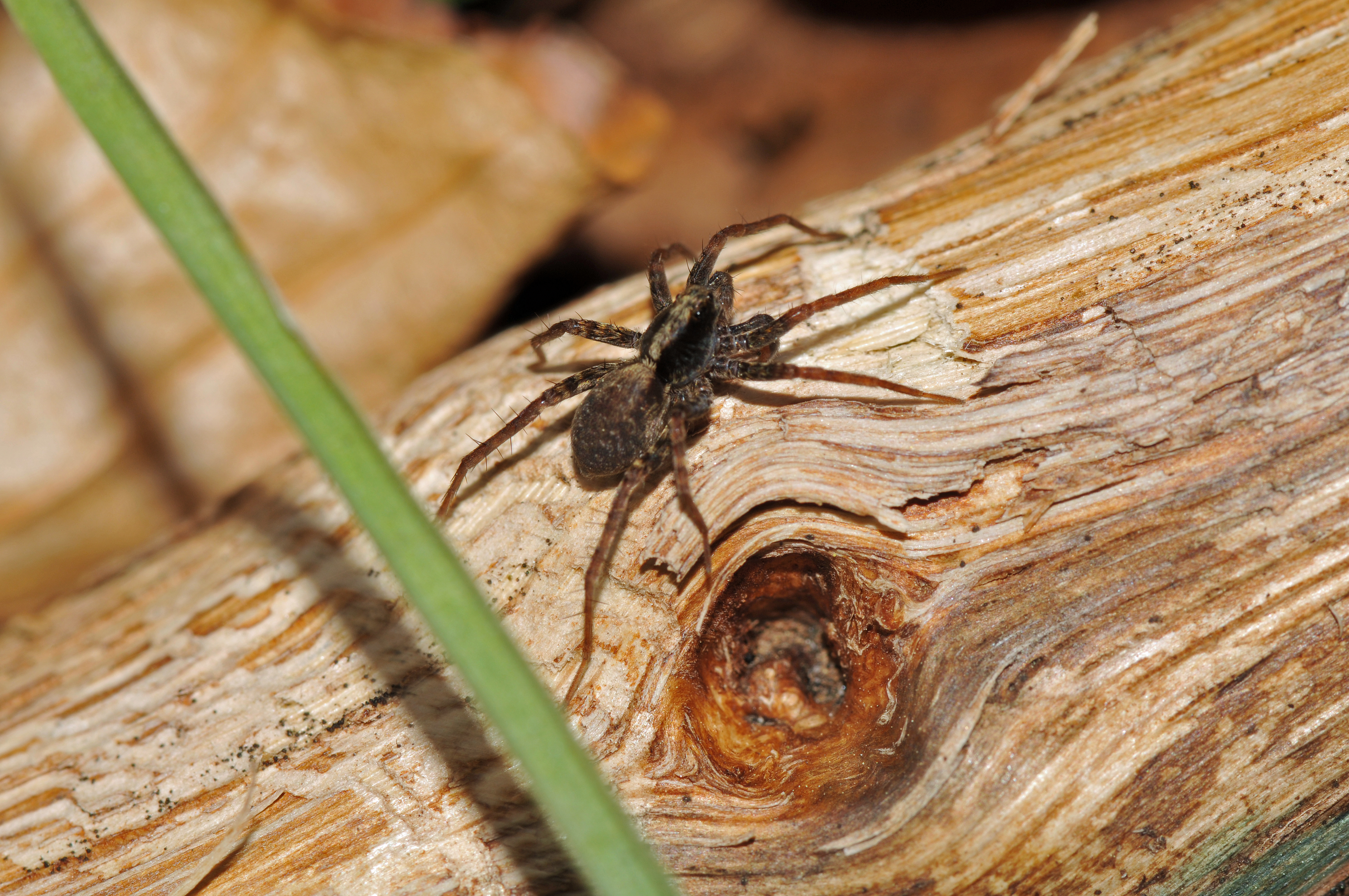 Pardosa saltants ♀ Töpfer-Hofmann & Von Helversen, 2000